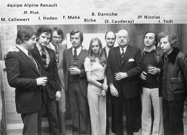 équipe Alpine Renault, pilotes et coéquipiers